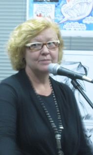 Kristiina Kolehmainen inviger seriecentret (Comic Center) vid Ryska statliga ungdomsbiblioteket i Moskva (12 oktober 2011).